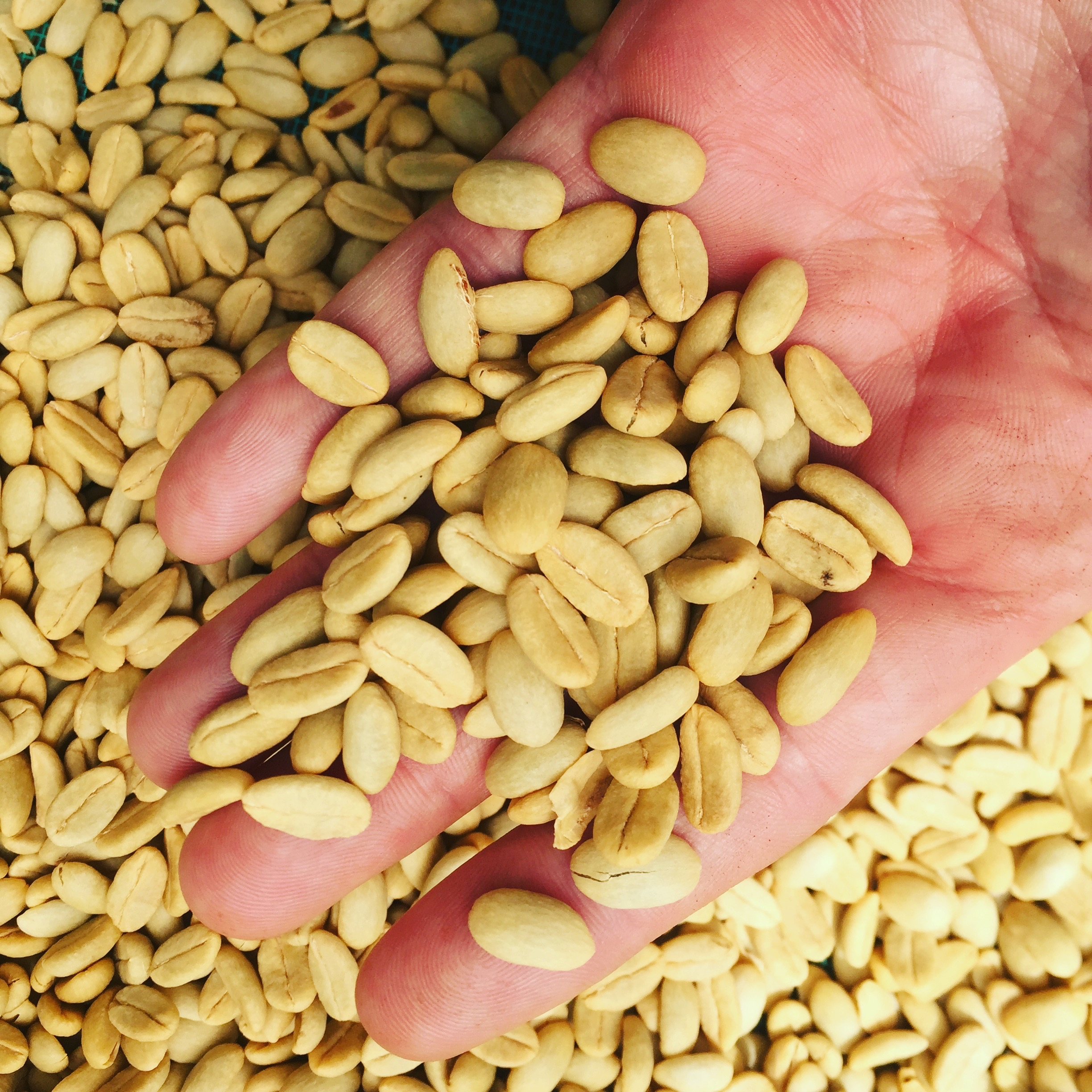 Café lavé (voie humide)